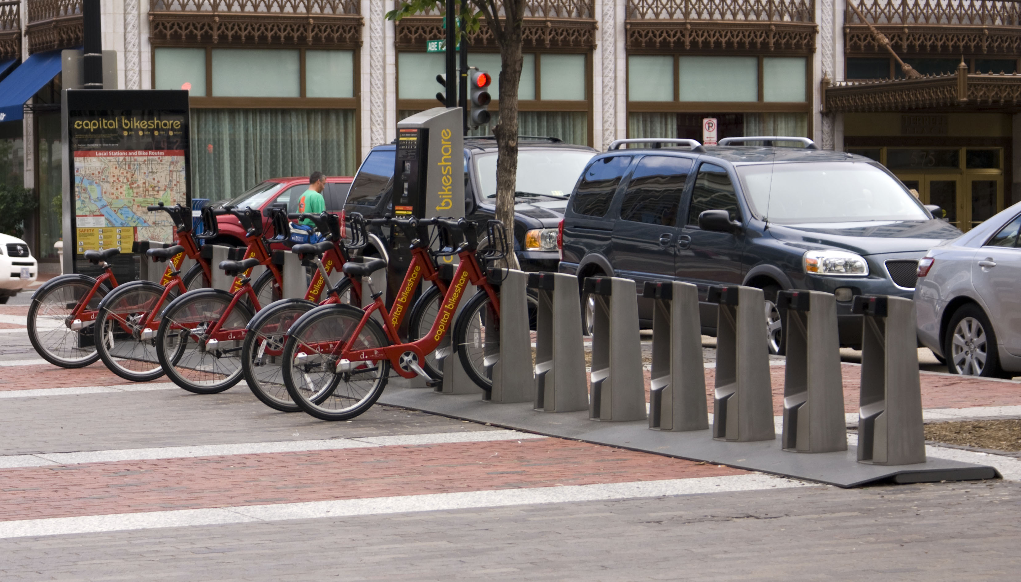 Eine Verleihstation des Capital Bikeshare-Programms